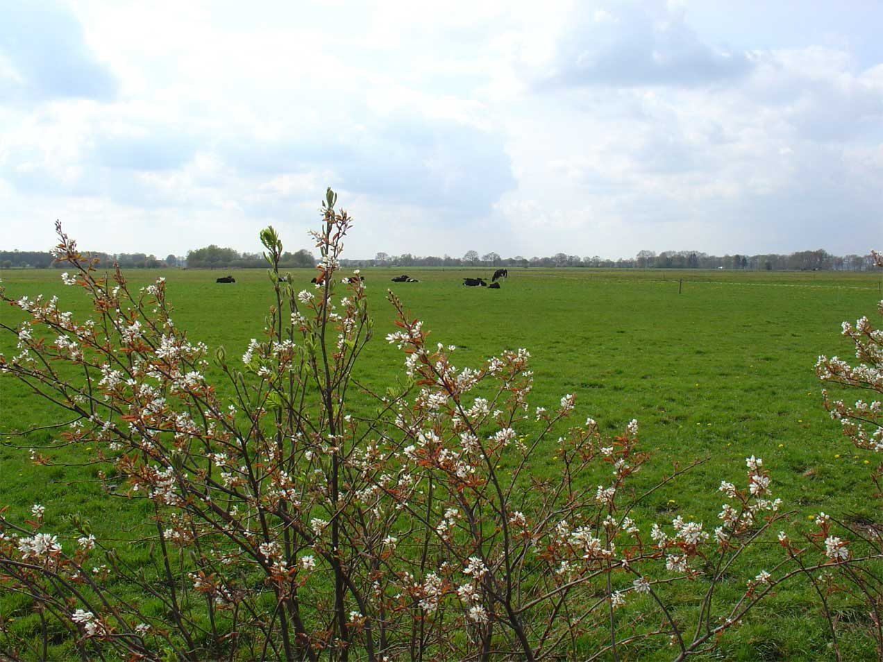 het Anserveld (gemeente De Wolden)